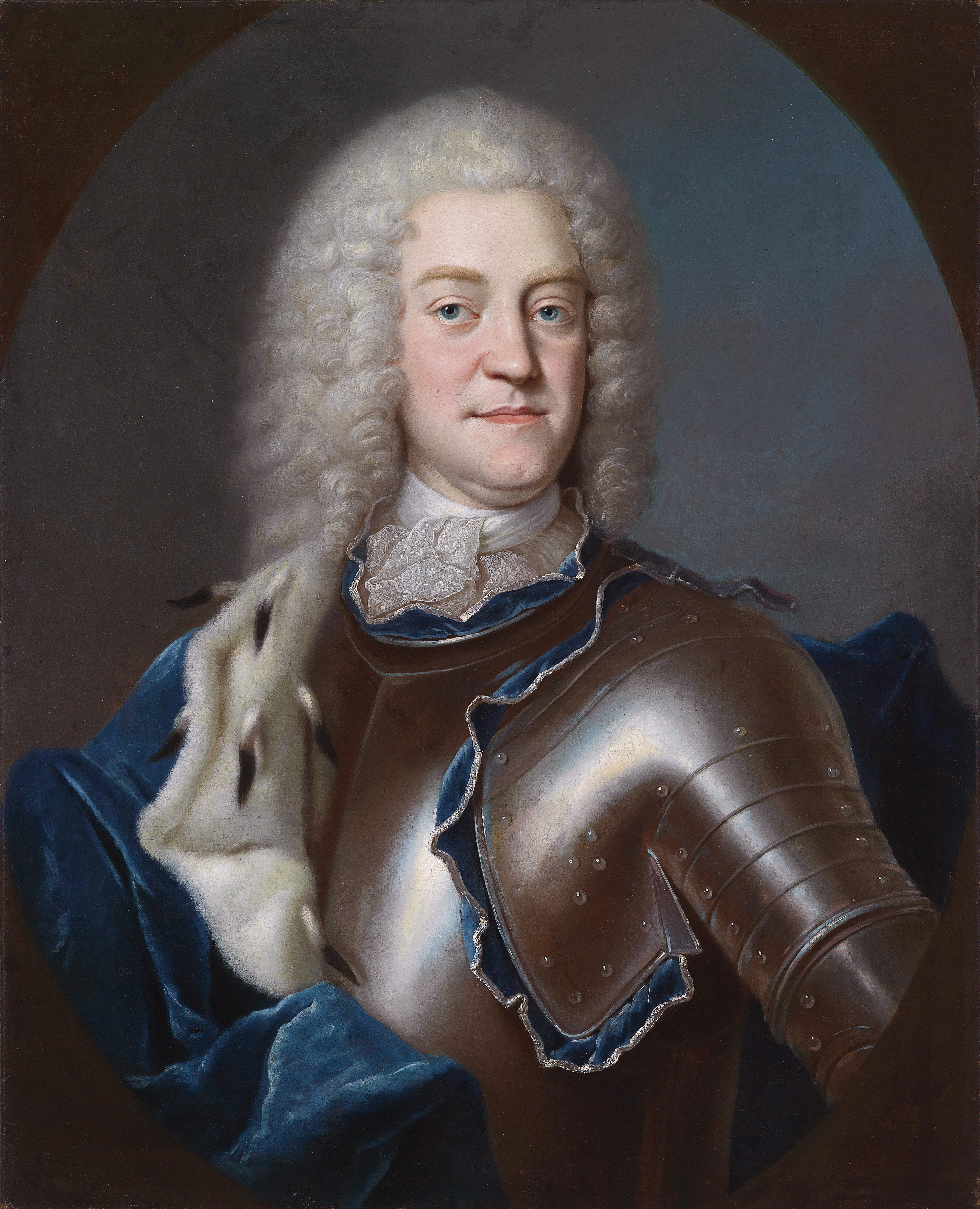 Christian Ludwig II, Duke of Mecklenburg-Schwerin (1683-1756)